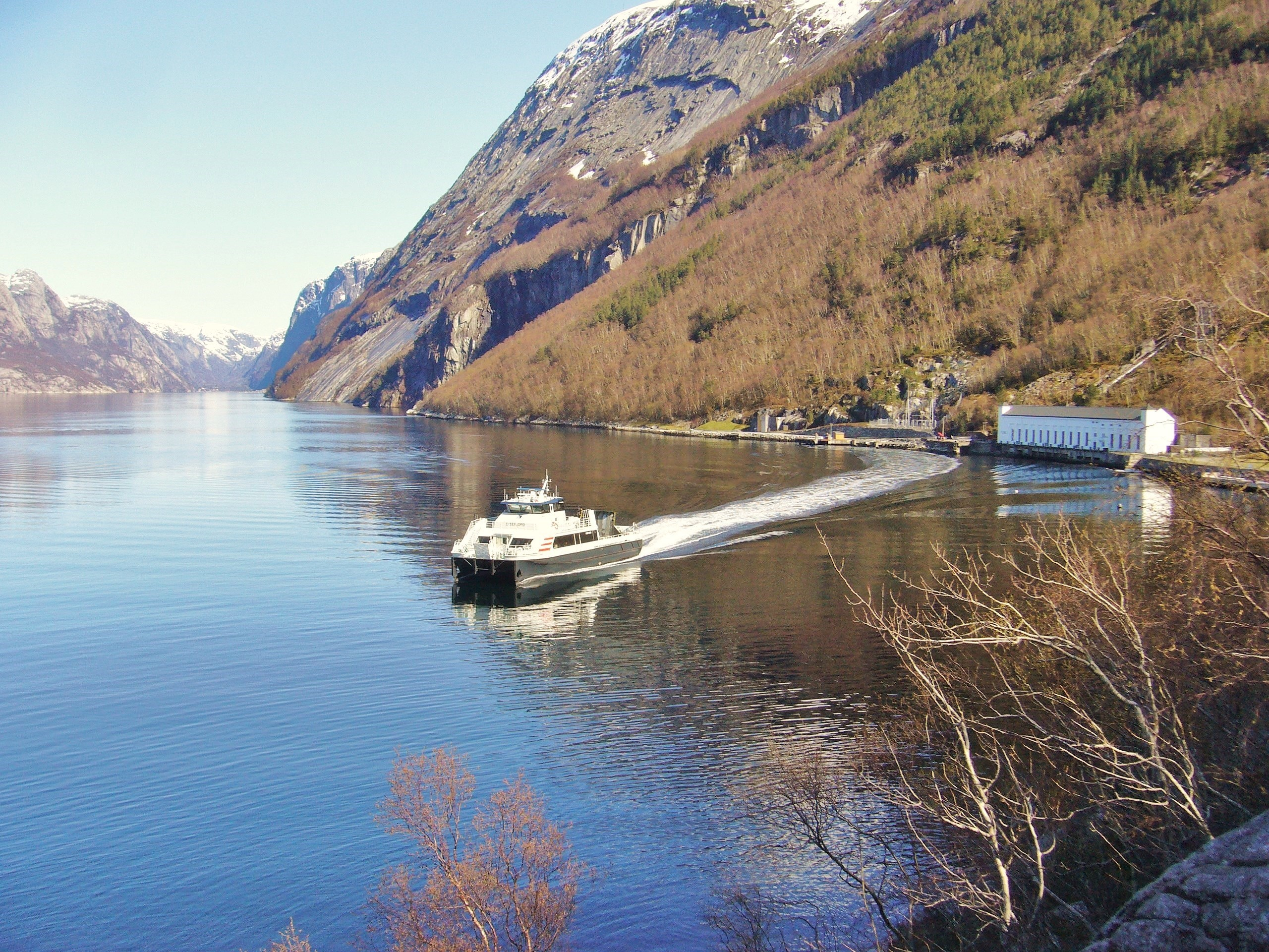 MS Lysefjord på vei ut fjorden fra Flørli